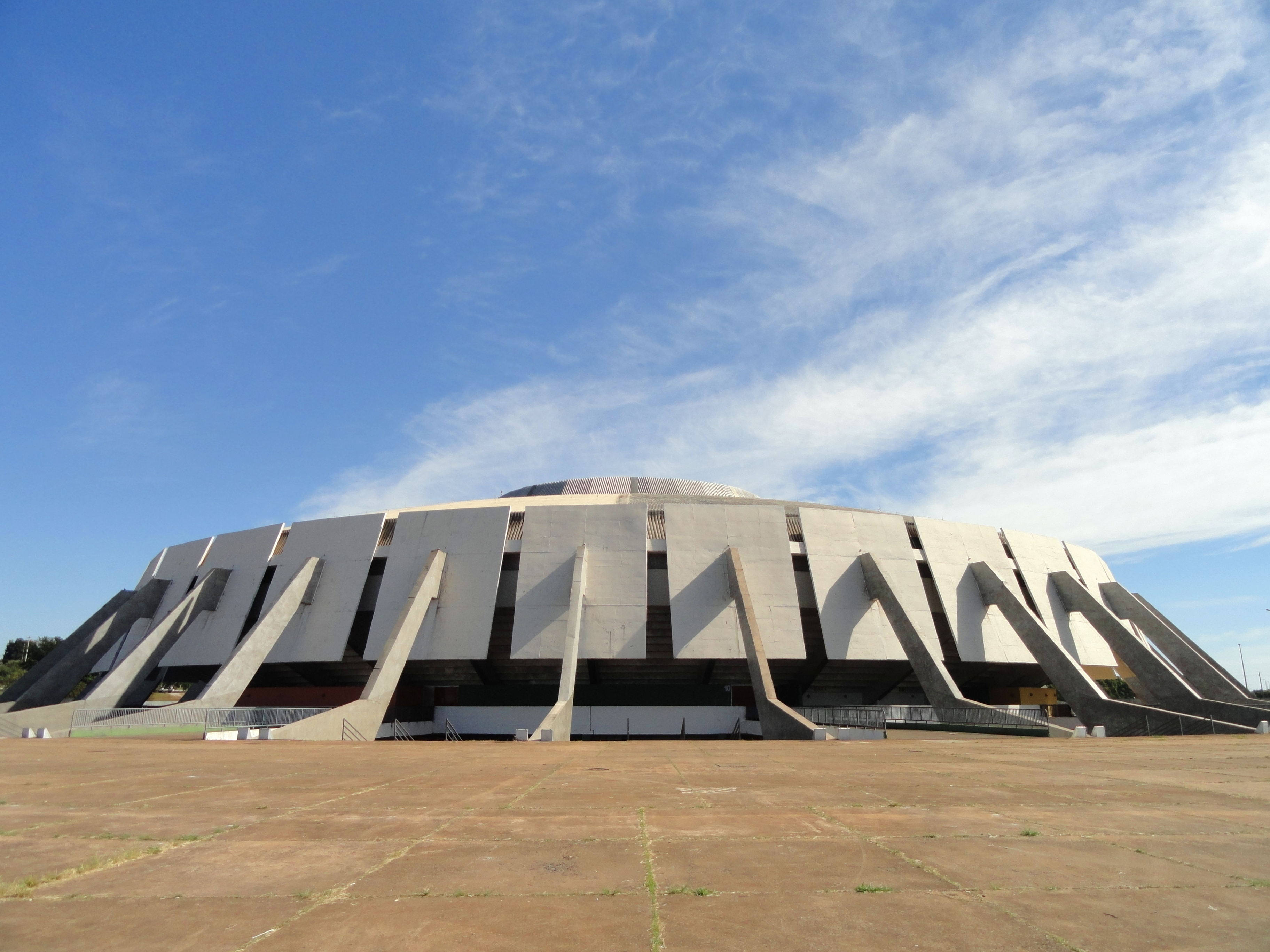 Ginásio Nilson Nelson, Brasília, Brazil.